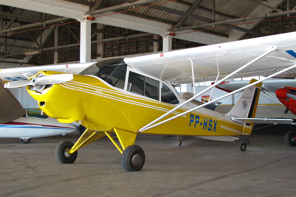 AeroBoero AB-180RVR